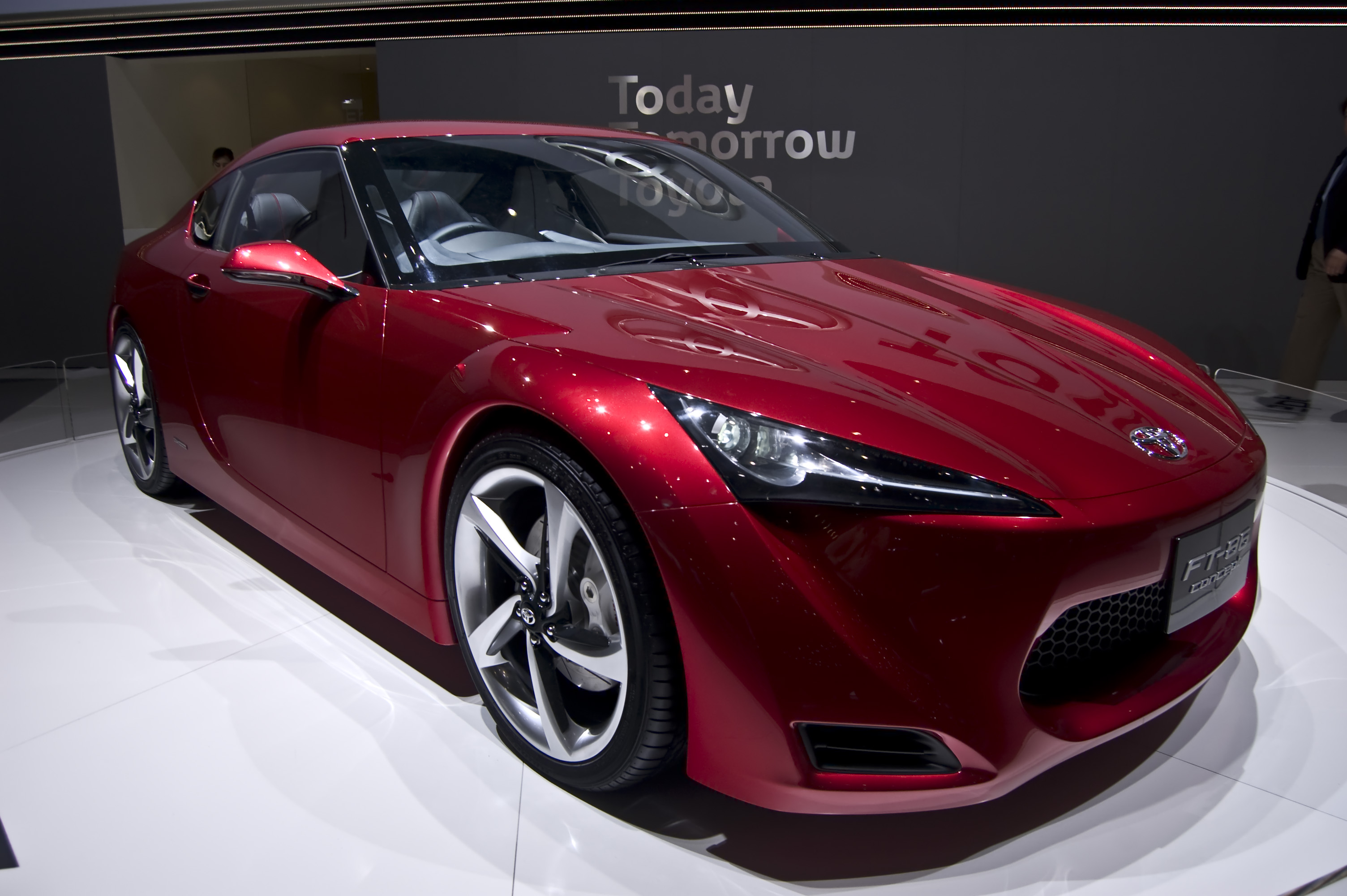 Toyota FT-86 Concept en el Salón de Ginebra 2010.